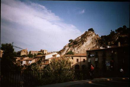 Estella, en Navarra (España)